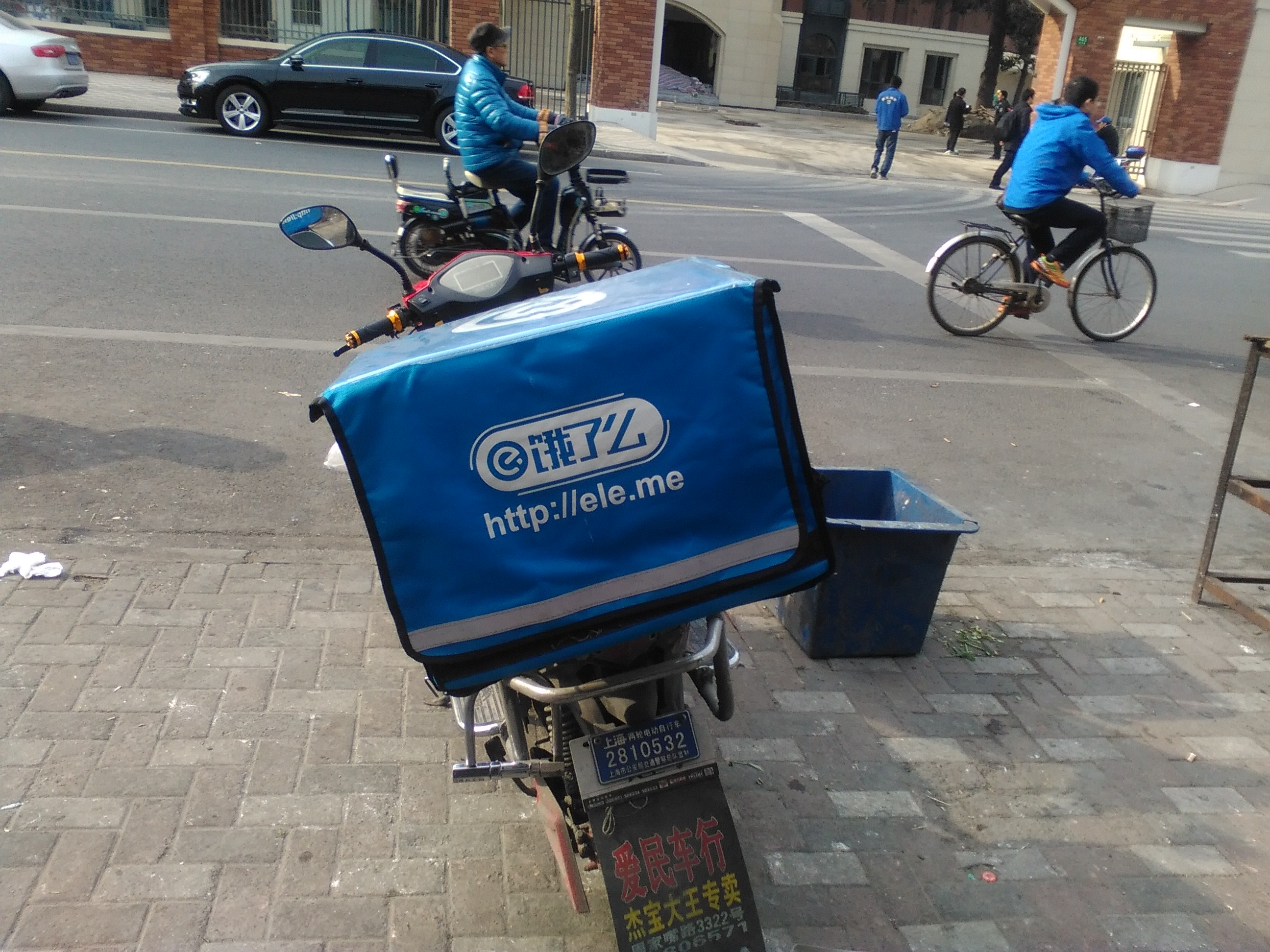 一辆停靠在上海杨浦区的饿了么外送车